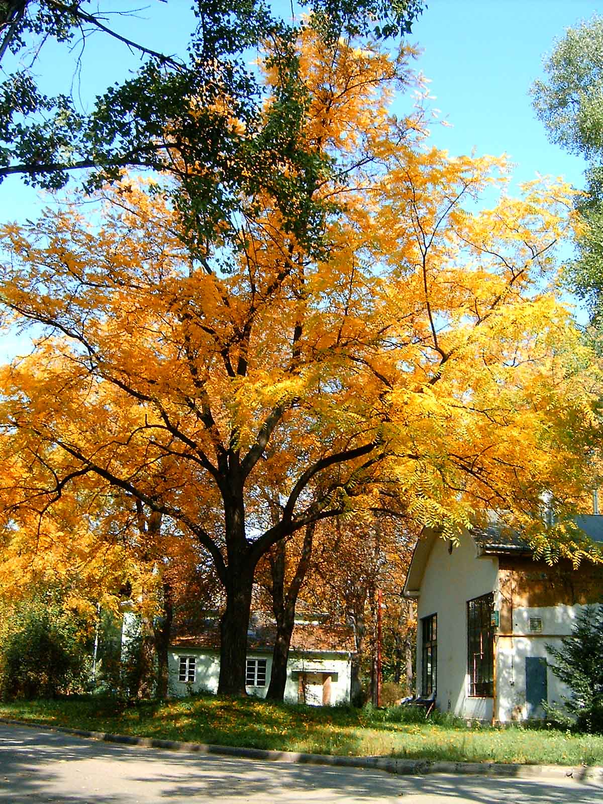 Hajógyári szigeti fa